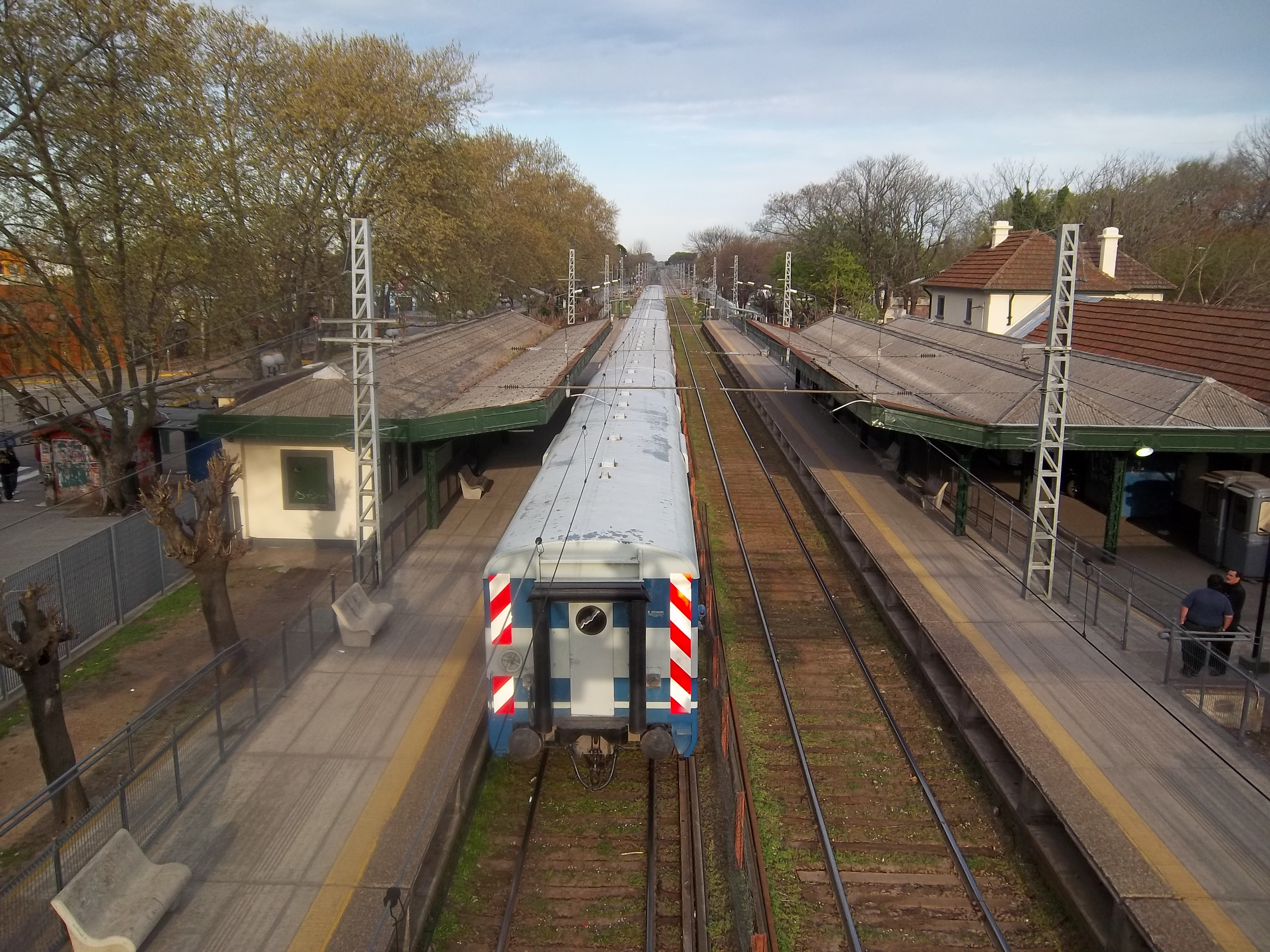 Estación Rafael Calzada del Ferrocarril General Roca en Rafael Calzada, partido de Almirante Brown, provincia de Buenos Aires, Argentina.